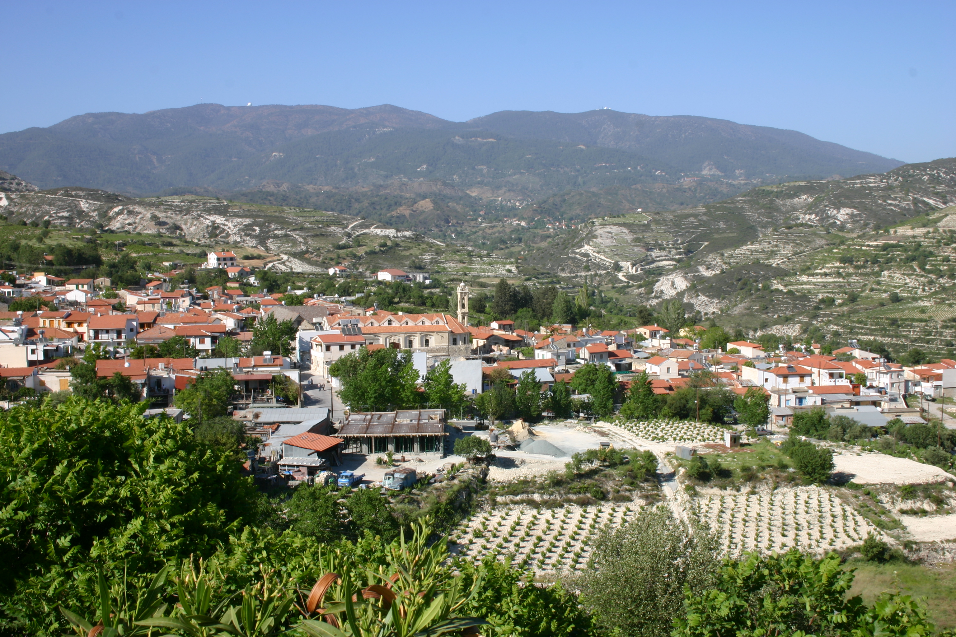 Vue générale d'Omodos et son vignoble